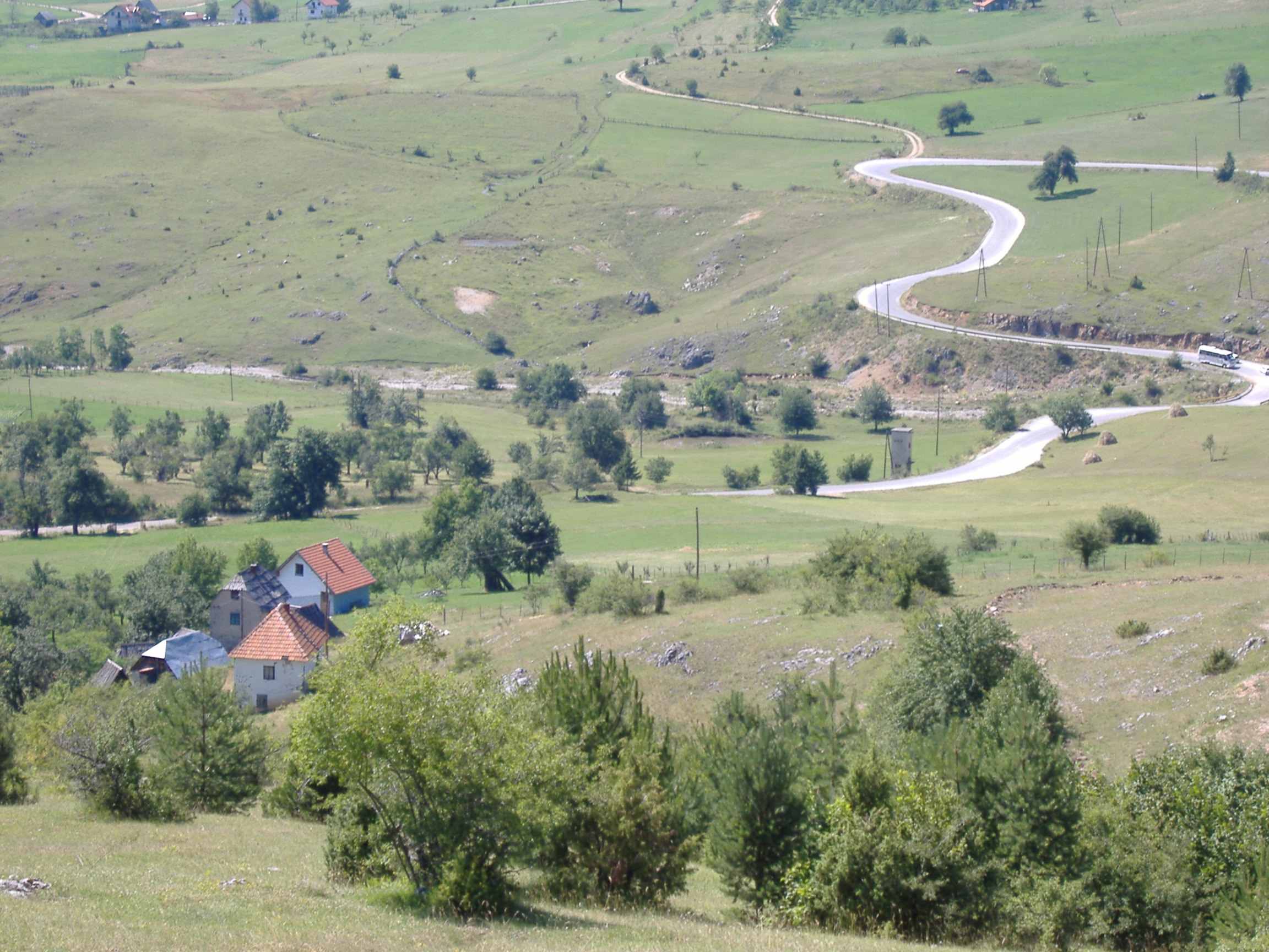 Отиловићи